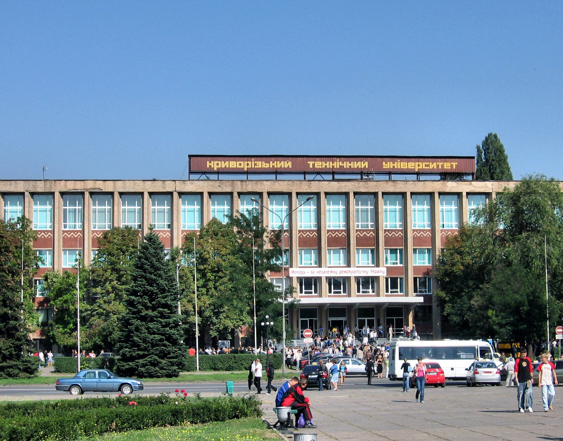 Криворізький технічний університет